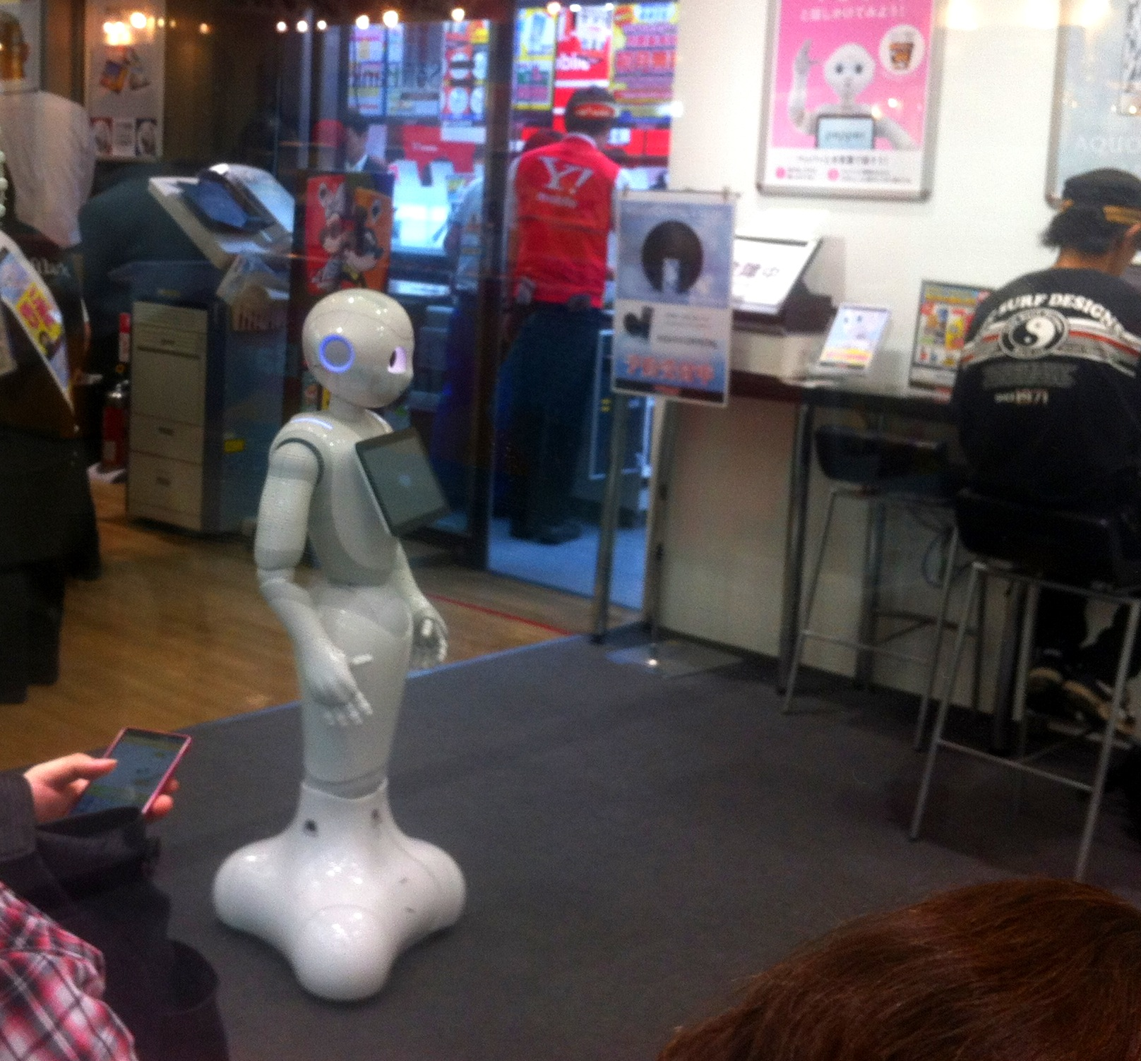 pepper（ペッパー)、日本のヒューマノイドロボット Pepper, a Japanese humanoid robot